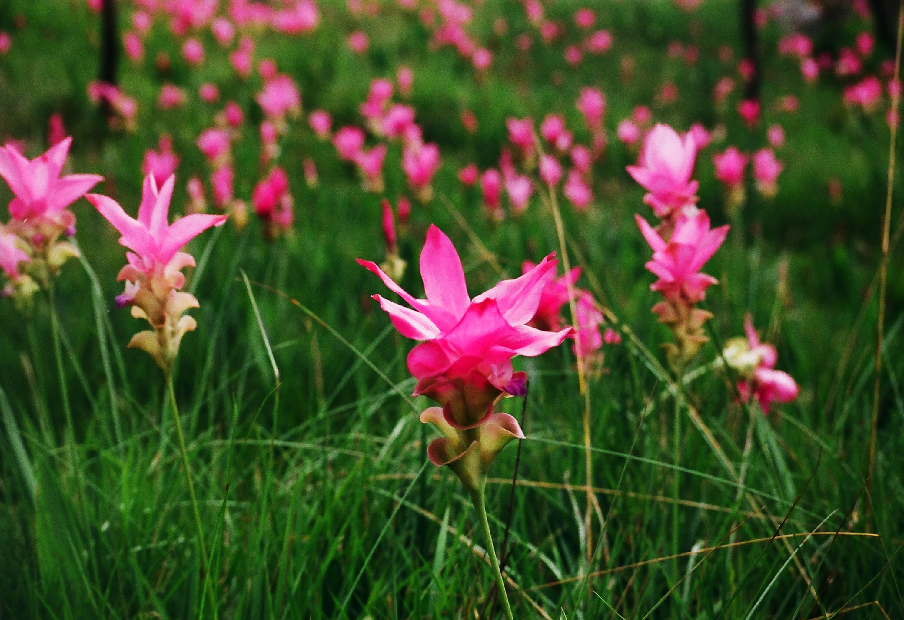 ทุ่งดอกปทุมมา (กระเจียวบัว) ที่ป่าหินงาม